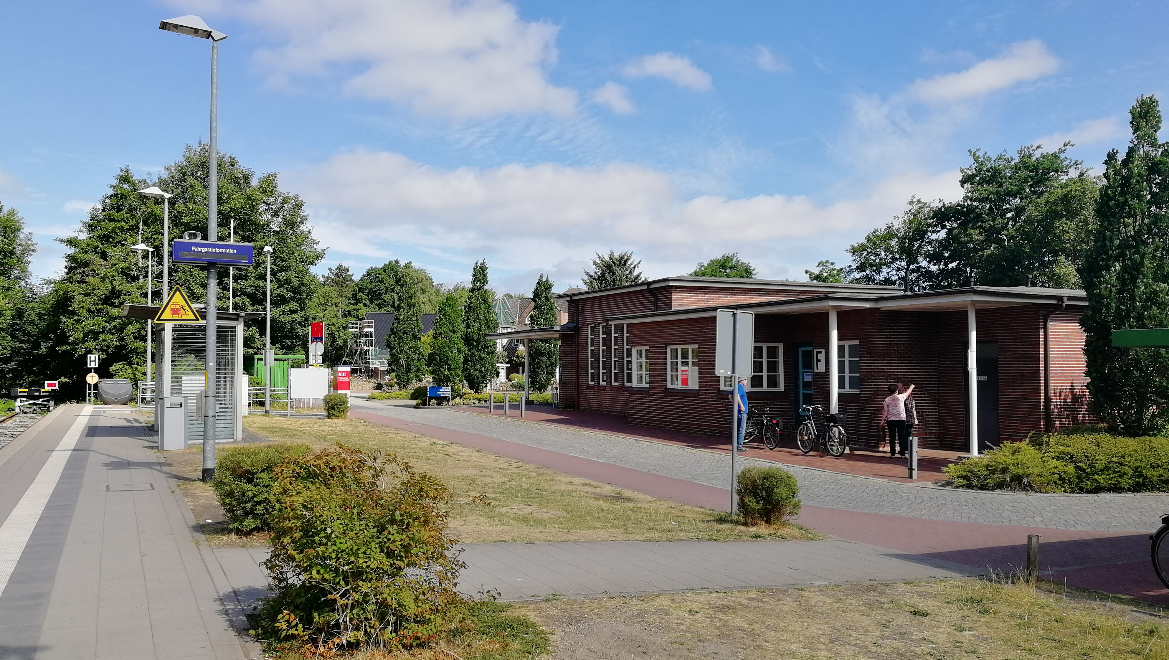 Bahnhof Bad St Peter-Ording, Endhaltstelle der eingleisigen Regionalbahnstrecke von Husum.